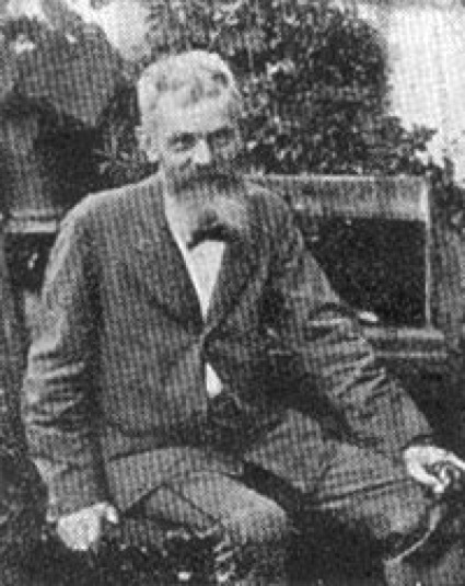 Foto di Federigo Pastoris (Asti, 1837 – Torino, 1888)